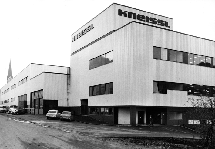 Kneissl Skifabrik Kufstein 1956/1969